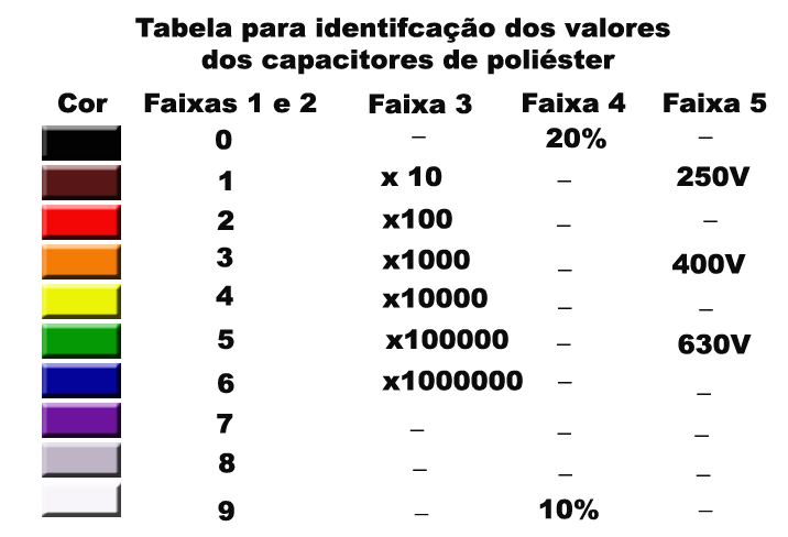 Tabela para identificaÃ§Ã£o dos valores dos capacitores de poliÃ©ster. Autoria: AndrÃ© Dias Mesquita